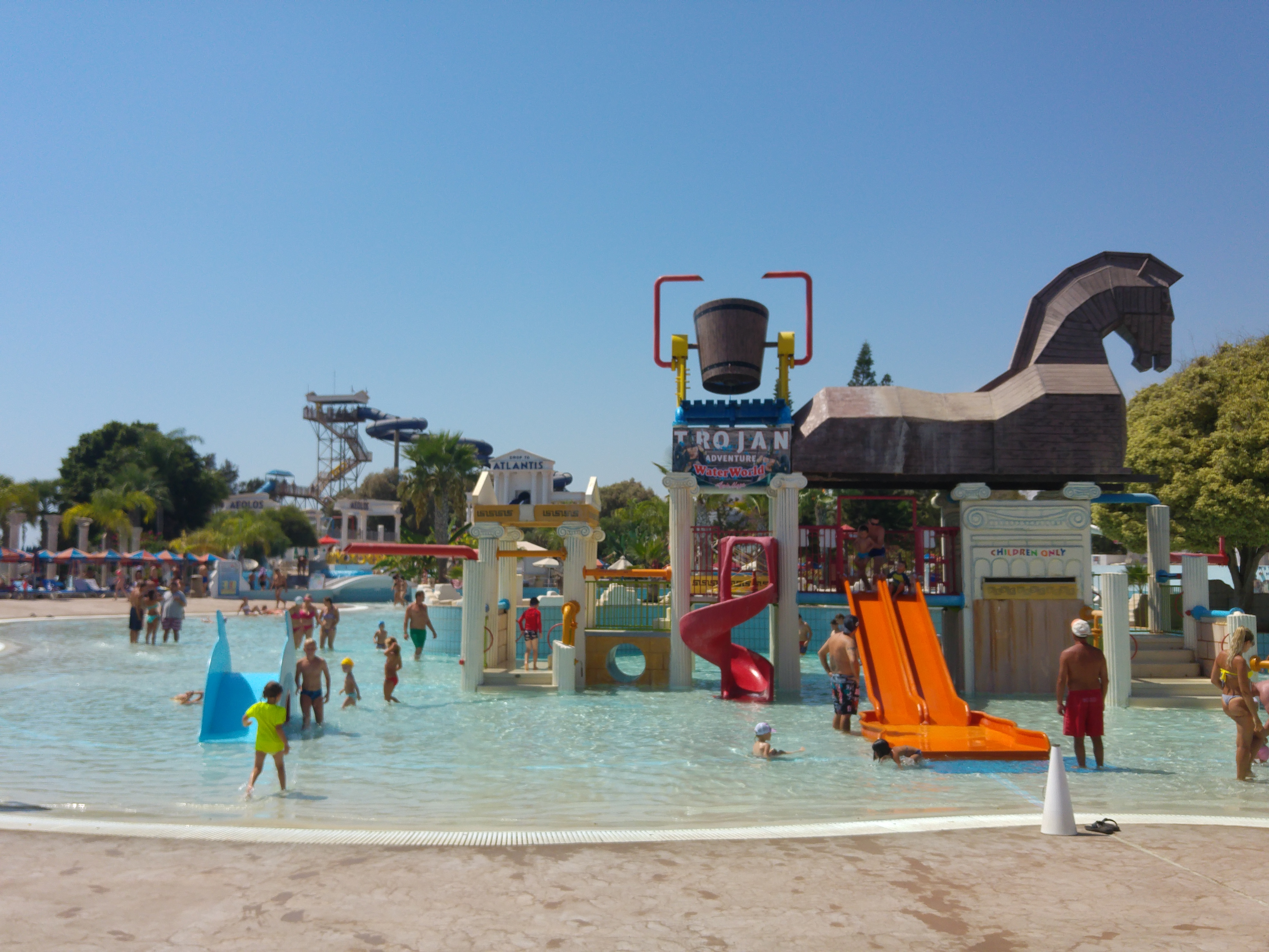 Waterworld Waterpark